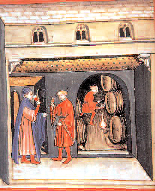 Miniature du Codex Vindobonensis, 1370-1400